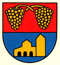 Wappen von Fully Kanton Wallis Schweiz